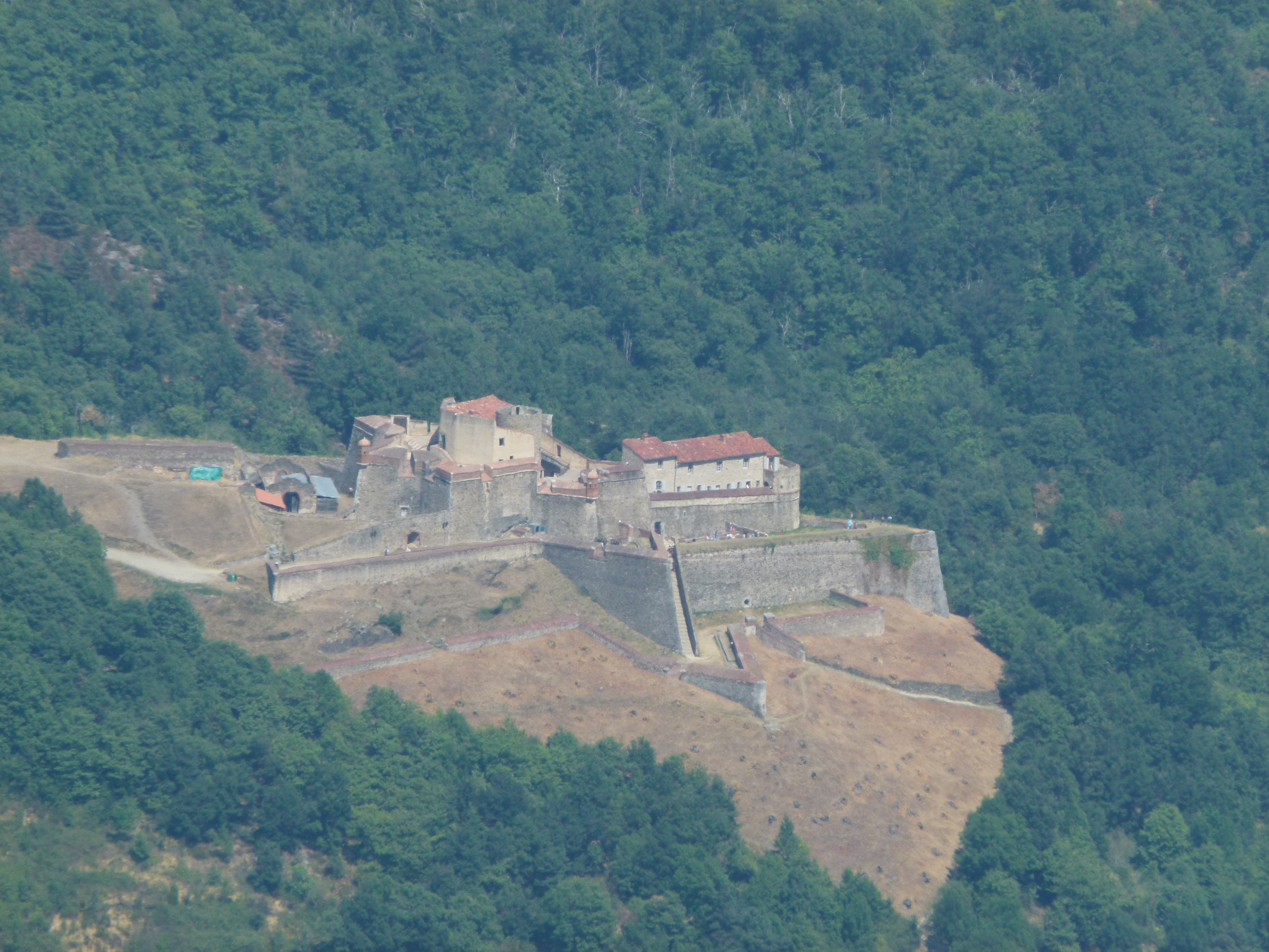 Fort Laguarda (Prats de Molló i la Presta) .